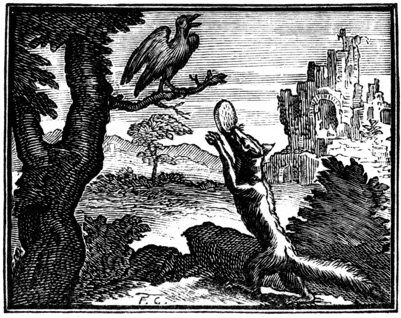 Illustrations pour les « Fables choisies mises en vers par M. de la Fontaine », Claude Barbin et Denys Thierry, Paris, 1668 (premier recueil) 1678-79 (deuxième recueil) 1694 (troisième recueil). Numérotation Charpentier (1705).